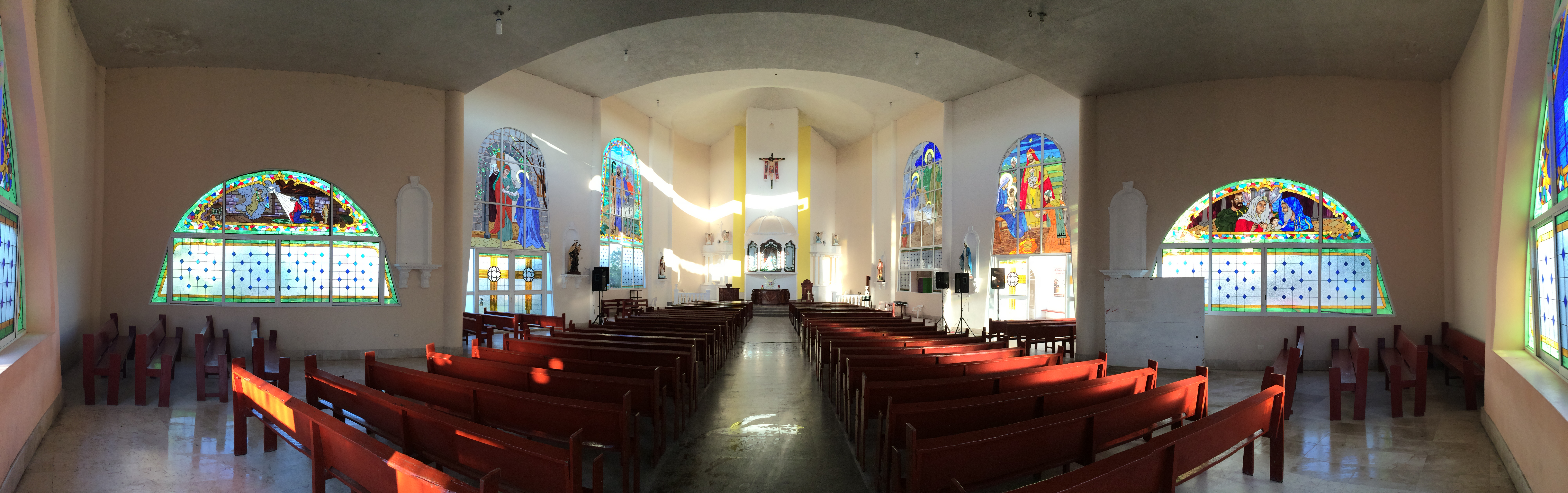 Vista Panoramica de la Parroquia de la Virgen de la Natividad